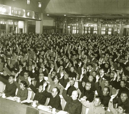 中文（中国大陆）: 中华人民共和国第二届全国人民代表大会第一次会议在北京闭幕。